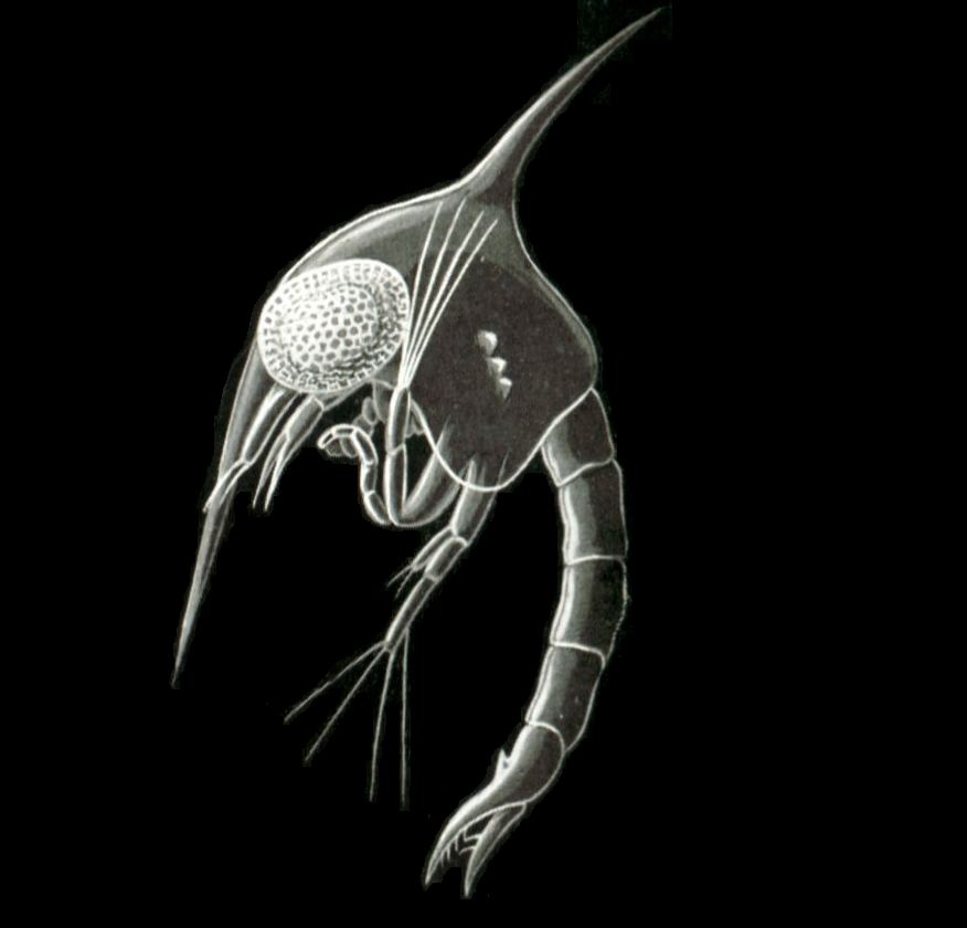 Zoea Carcini (Milne-Edwards) = Carcinus maenas, zoea larva